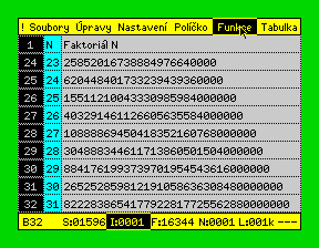 Screenshot z práce v tabulkovém procesoru Calculus firmy Proxima (autor Universum) pro Sinclair ZX Spectrum